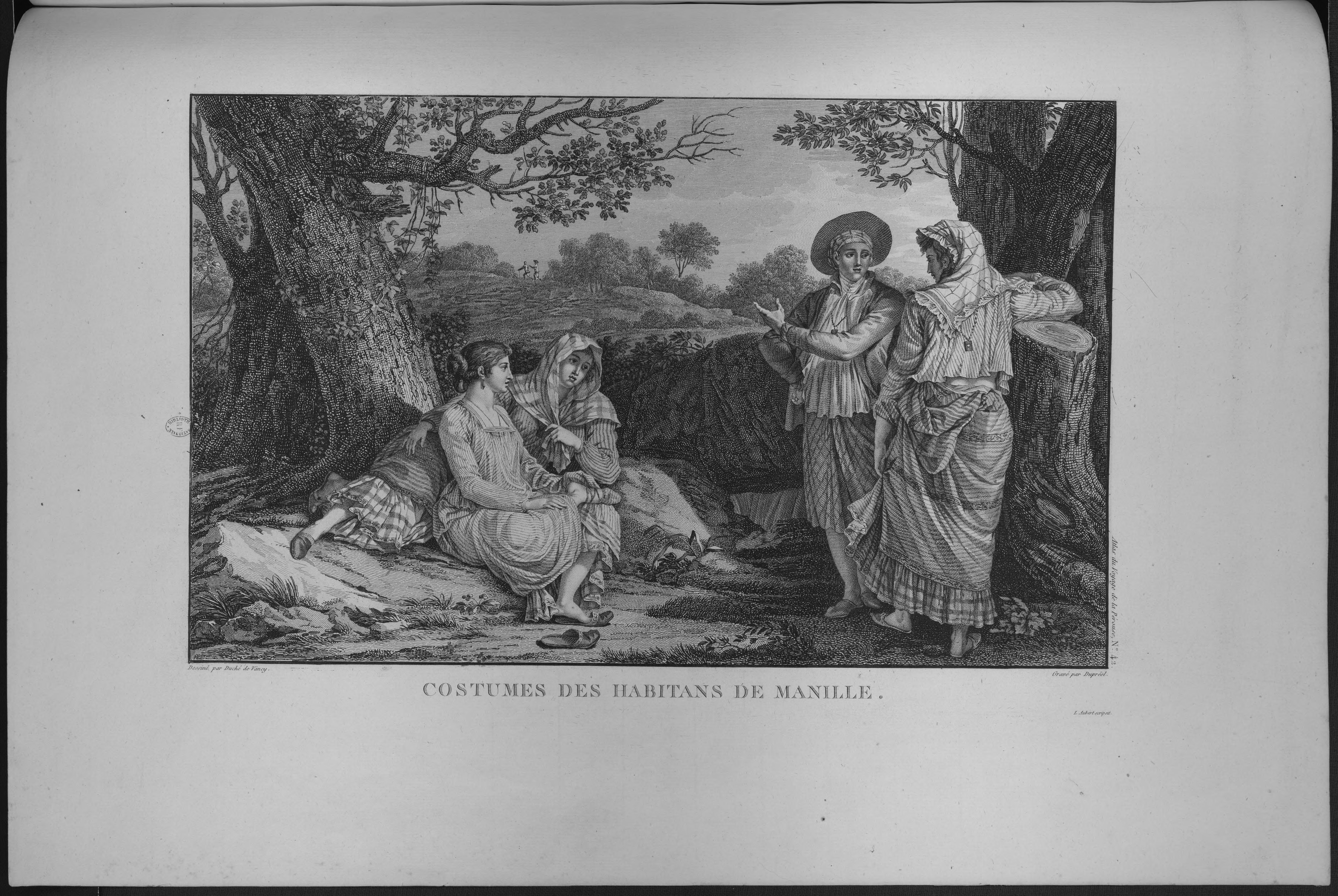 Atlas du voyage de La Pérouse